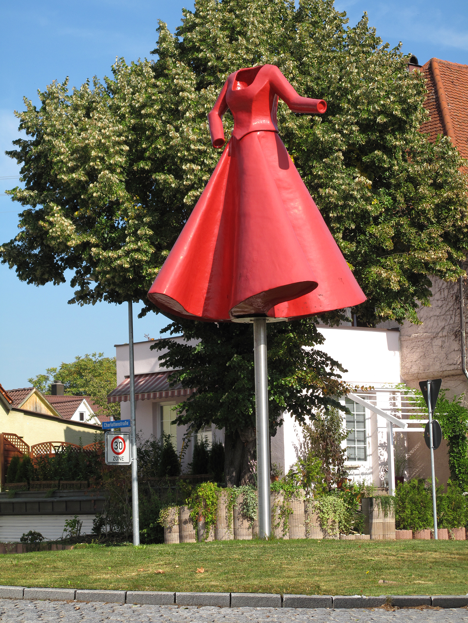 Anja Luithle, Die Wegweiserin, 2009, - Deutschland, Baden-Württemberg, Eislingen/Fils, Verkehrskreisel Hindenburg-/Jahnstraße